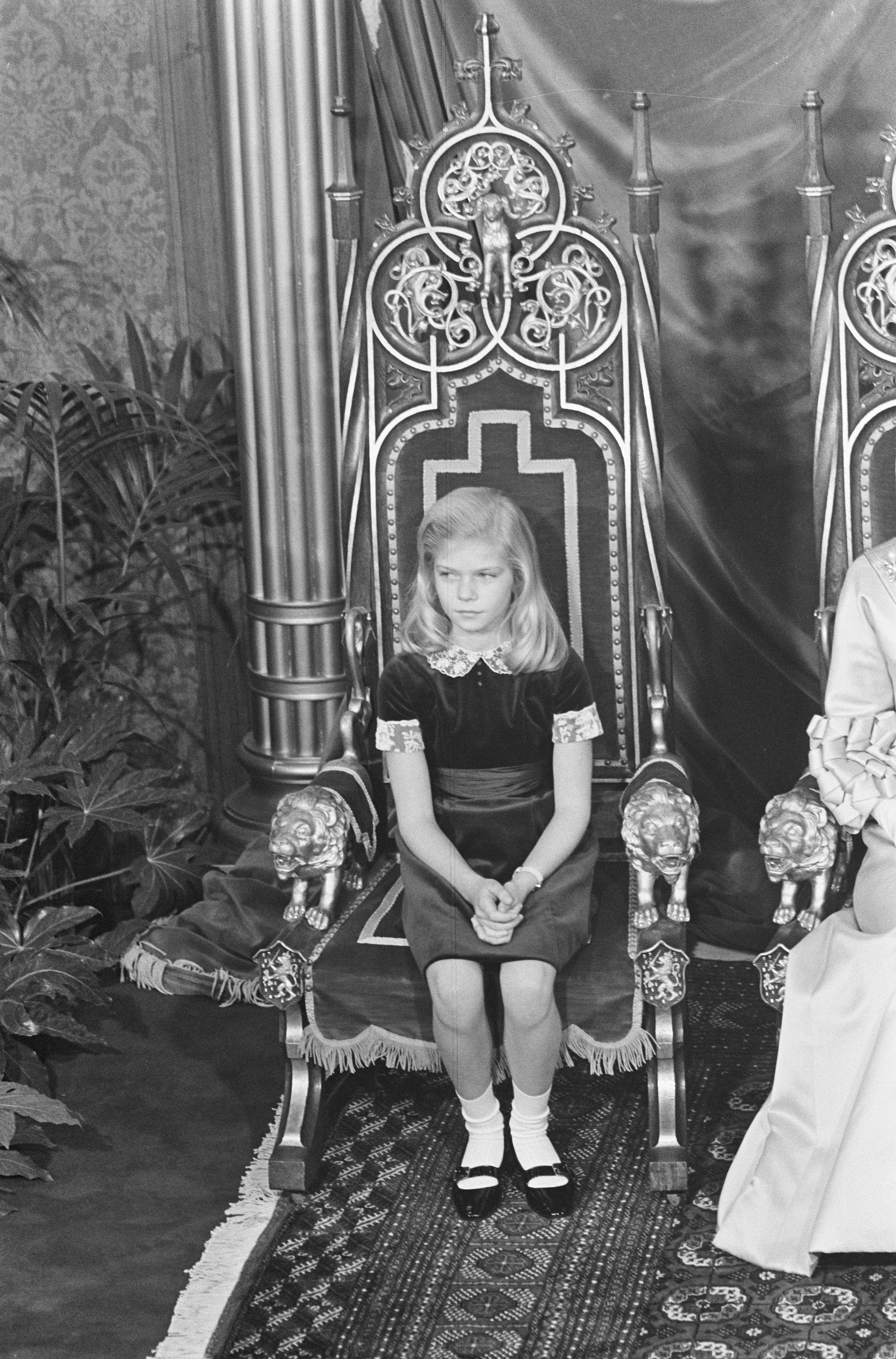 D'Prinzessin Marie-Astrid vu Lëtzebuerg, den 12. November 1964 bei der Vereedegungszeremonie vun hirem Papp, dem Groussherzog Jean.